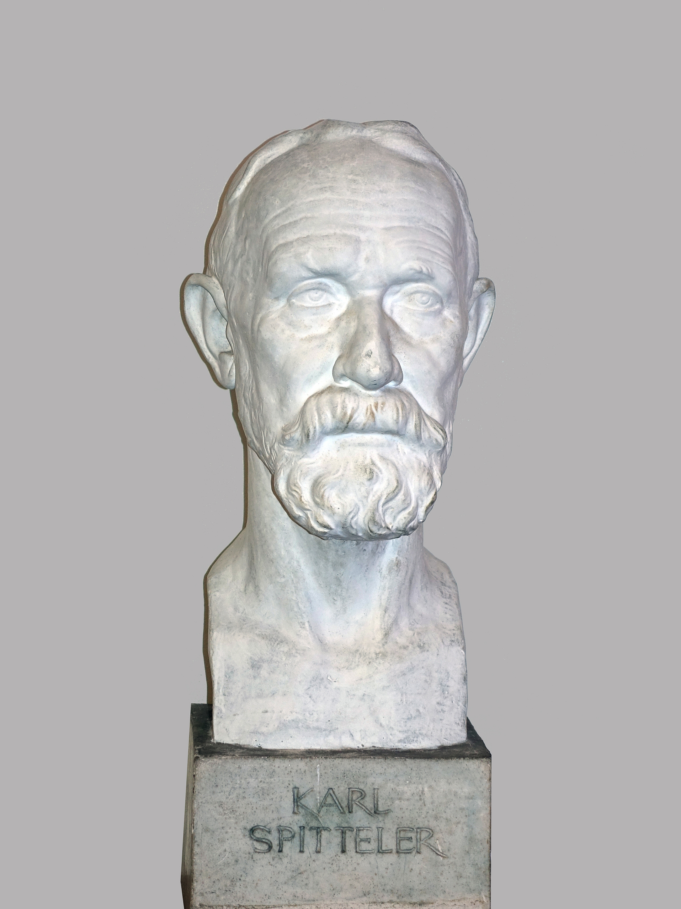 Gips Büste von Carl Spitteler (1845–1925) Schriftsteller, Dichter von Jakob August Heer (1867–1922) Bildhauer, Medailleur. Liestal, Schweiz